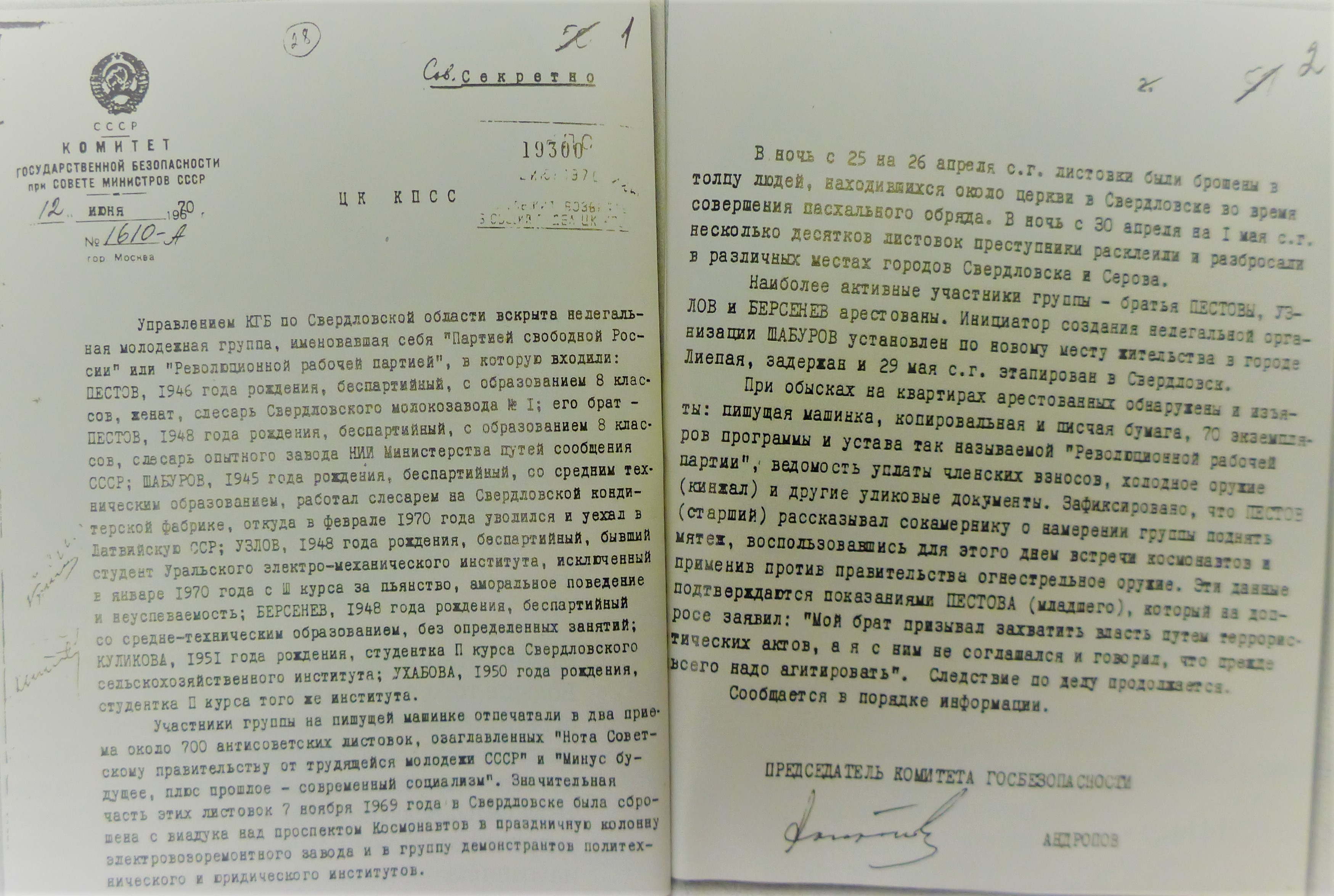 Записка Председателя КГБ Юрия Андропова в ЦК КПСС от 12 июня 1970 года об аресте в Свердловске группы Свободной России/ Микрофильм с копией документа хранится в собрании Гуверовского архива Стэнфордского университета в Пало Альто. Hoover Institution Archives, Stanford University Collection Archives of the Soviet Communist Party and Soviet state (fond 89), Reel 1.1001. Оп. 37. Д. 28